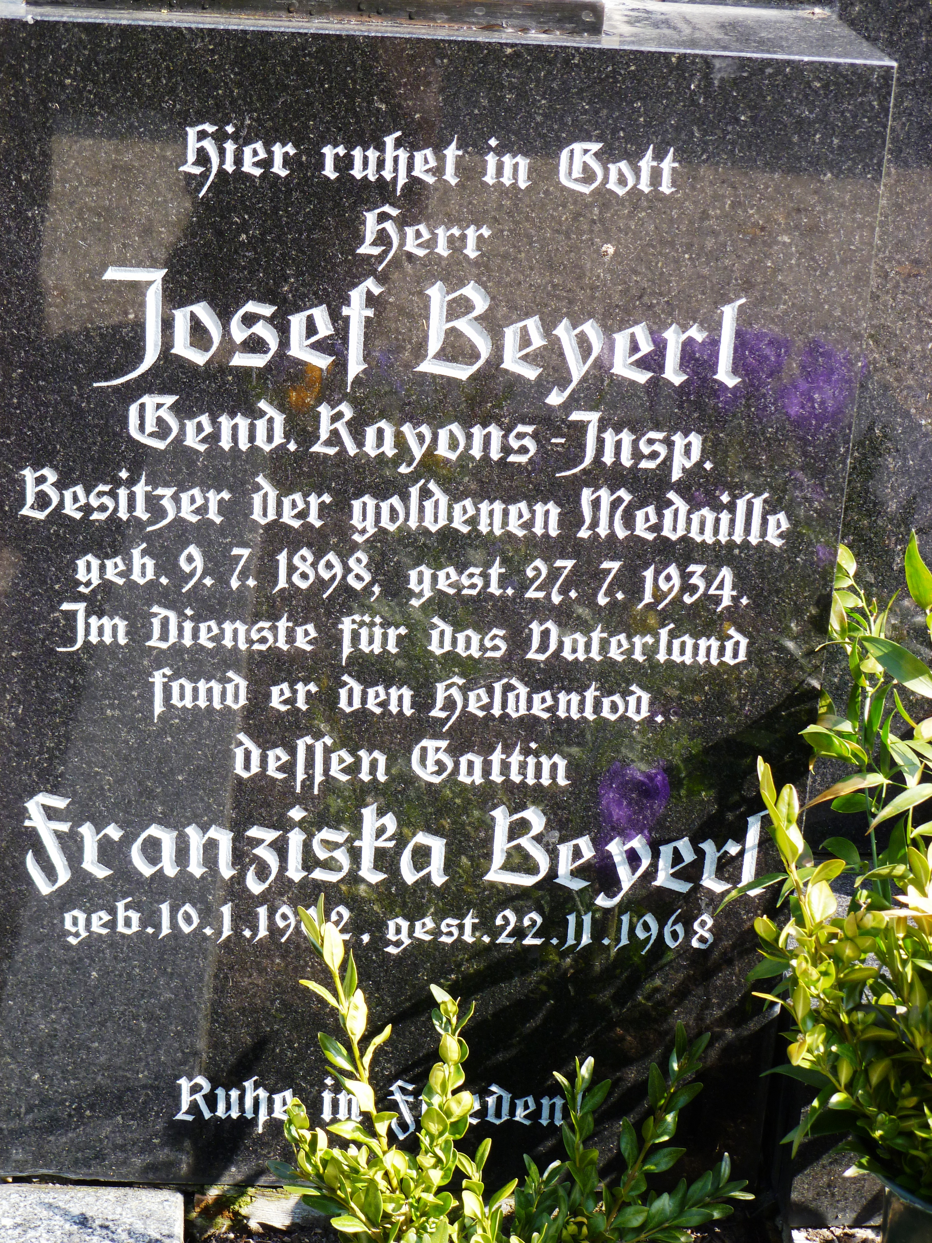 Grabstein am Friedhof Wilhering